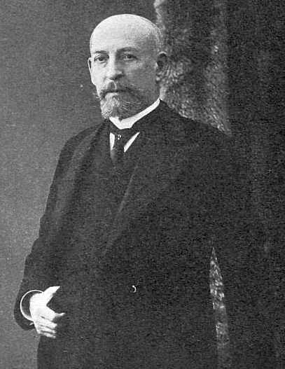 Куракин Анатолий Александрович